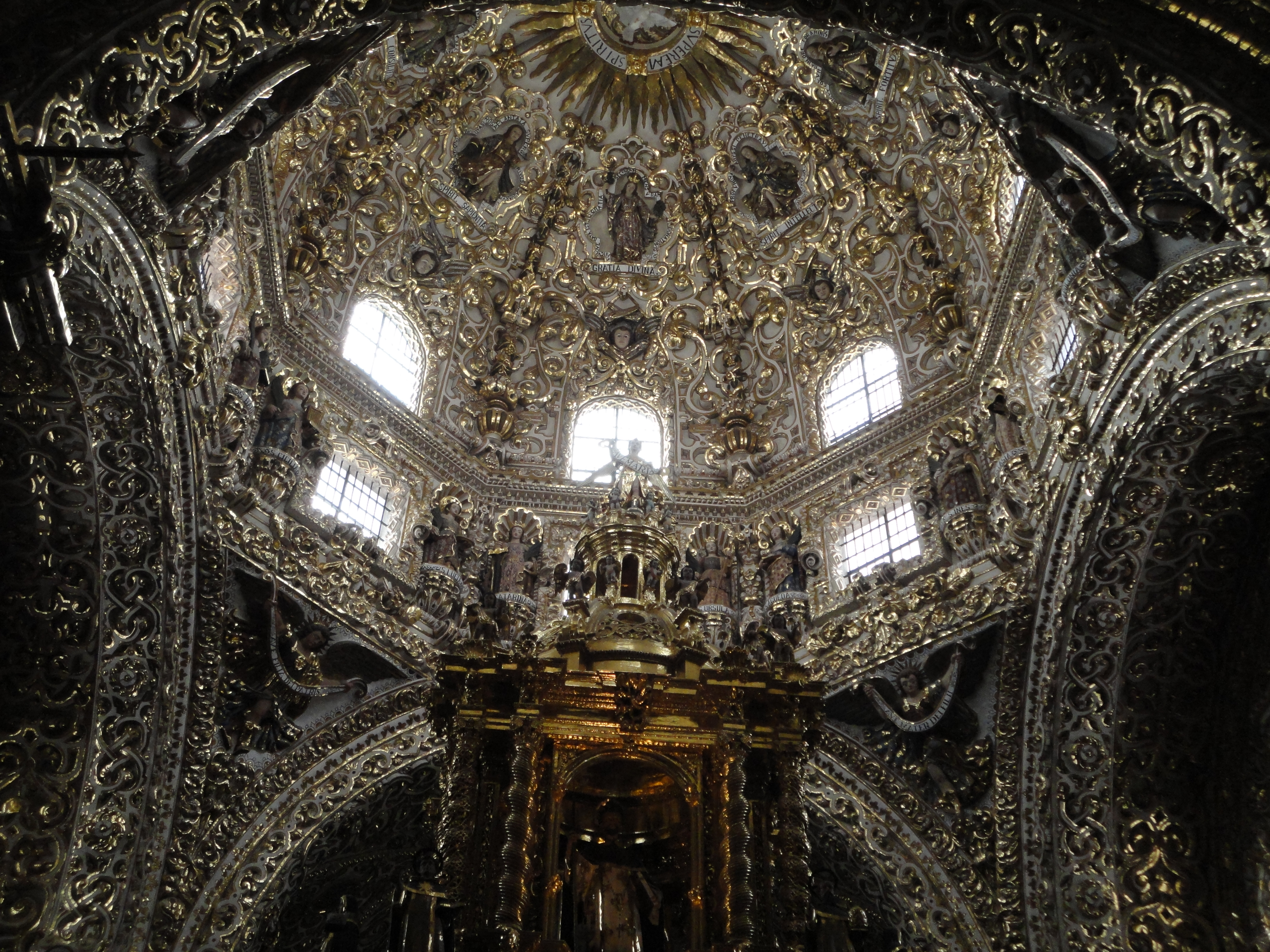 Cúpula de la Capilla del Rosario